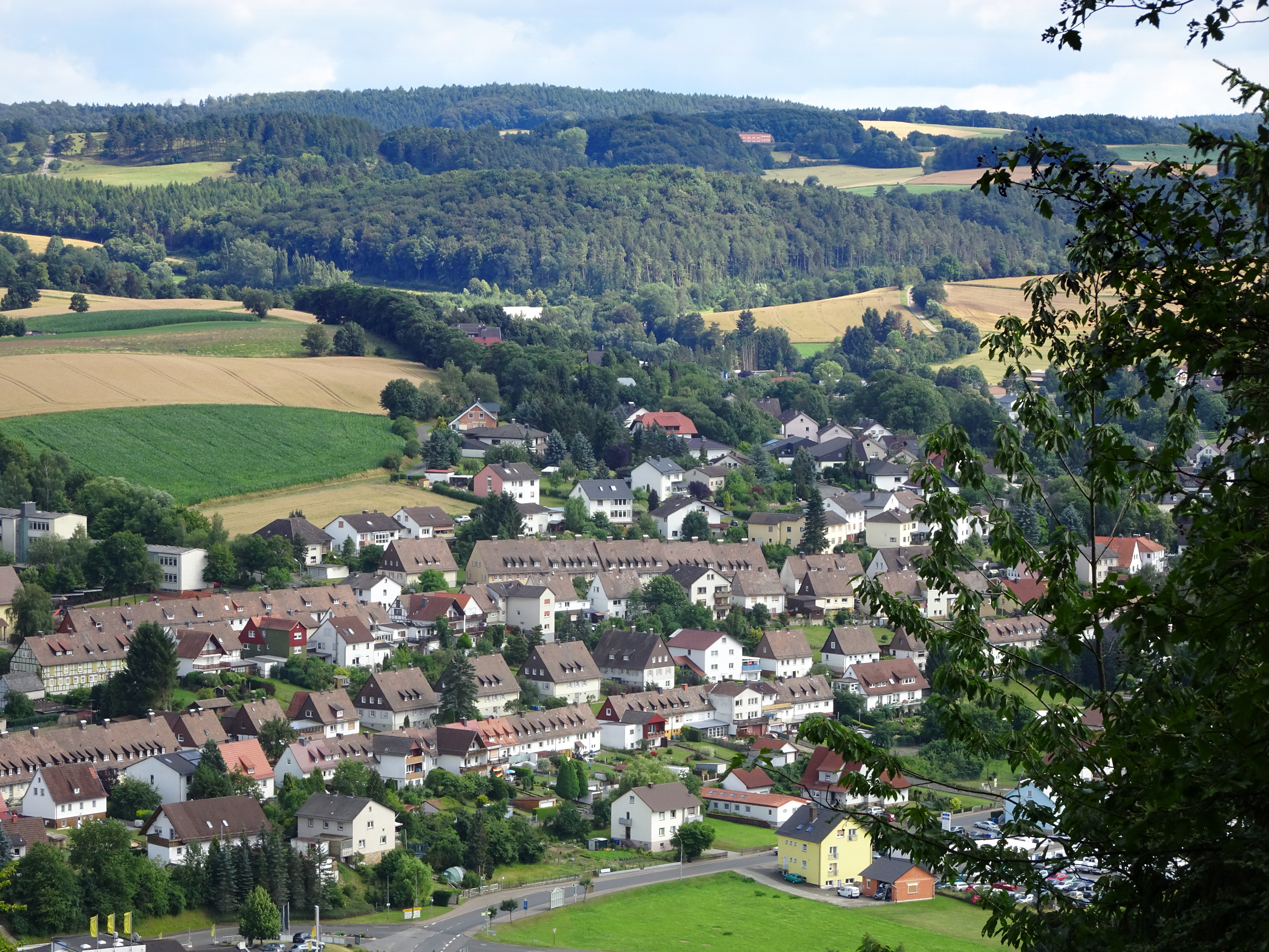 Sontra im nordhessischen Werra-Meißner-Kreis. Die frühere (Bergbau-)Siedlung II. Oben die "Schulstraße" darunter die parallel verlaufende "Knappenstraße". Ganz unten die ehemalige Bundesstraße 27 und nach dem Bau der Umgehung, die heutige Innerortsstraße "Göttinger Straße" " Gesamtanlagen Barbaraplatz und Glückaufplatz In der Mitte der dreißiger Jahre des 20. Jahrhunderts sollte der Kupferschieferbergbau im Richelsdorfer Gebirge erneut aufgenommen werden, nachdem die Arbeiten 1870 eingestellt worden waren. Zu diesem Zweck mussten Wohnmöglichkeiten für die zuziehenden Bergleute geschaffen werden, da die Bevölkerungszahl Sontras von 2400 Einwohnern im Jahr 1937 bis auf 5000 Einwohner im Jahr 1939 ansteigen sollte. Um den ersten Ansturm der angeworbenen Bergleute aus Schlesien und dem Saarland aufzufangen, wurden zwei Neubausiedlungen geplant. Die Konzeption, die im Dezember 1936 erstellt wurde, sah zwei getrennte Siedlungen am Stadtrand vor. Die Bebauung im Bereich des Barbaraplatzes sollte über 360, diejenige des Glückaufplatzes über 216 Wohneinheiten verfügen. Die Planungen gingen von einer Siedlungsstruktur aus, die sich um eine Mittelpunktfunktion einnehmende Platzeinheit mit einem zentralen, gemeinnützigen Gebäude konzentrierte. Die Straßenzüge, deren Zeilenbebauung von unterschiedlichen Haustypen geprägt wird, sollten sich dem Verlauf des umgebenden Geländes einfügen. Fachwerkarchitektur wechselt mit massiven Gebäuden, die jeweils in lockerer Gruppierung einander zugeordnet sind. Nach dem zweiten Weltkrieg kamen die Häuser in die Hände der halbstaatlichen Kurhessen Wohnungsbau GmbH, die privater Kundschaft Kaufmöglichkeiten eröffnete. Diese Privatisierung bedingte Eingriffe in die Bausubstanz, die die Einheitlichkeit des Ensembles jedoch kaum beeinträchtigten."